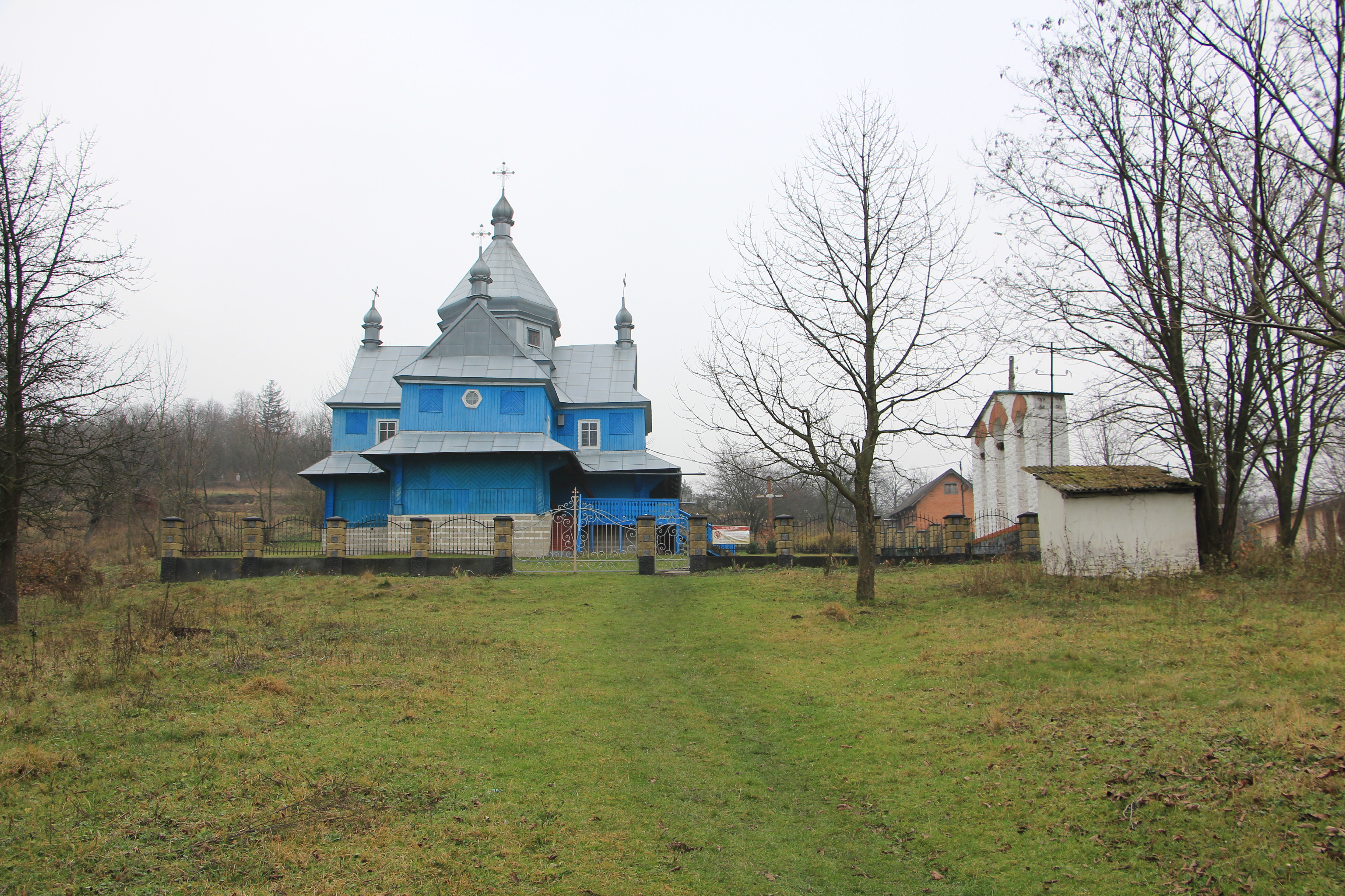 Дерев'яна церква в селі Бобрівники